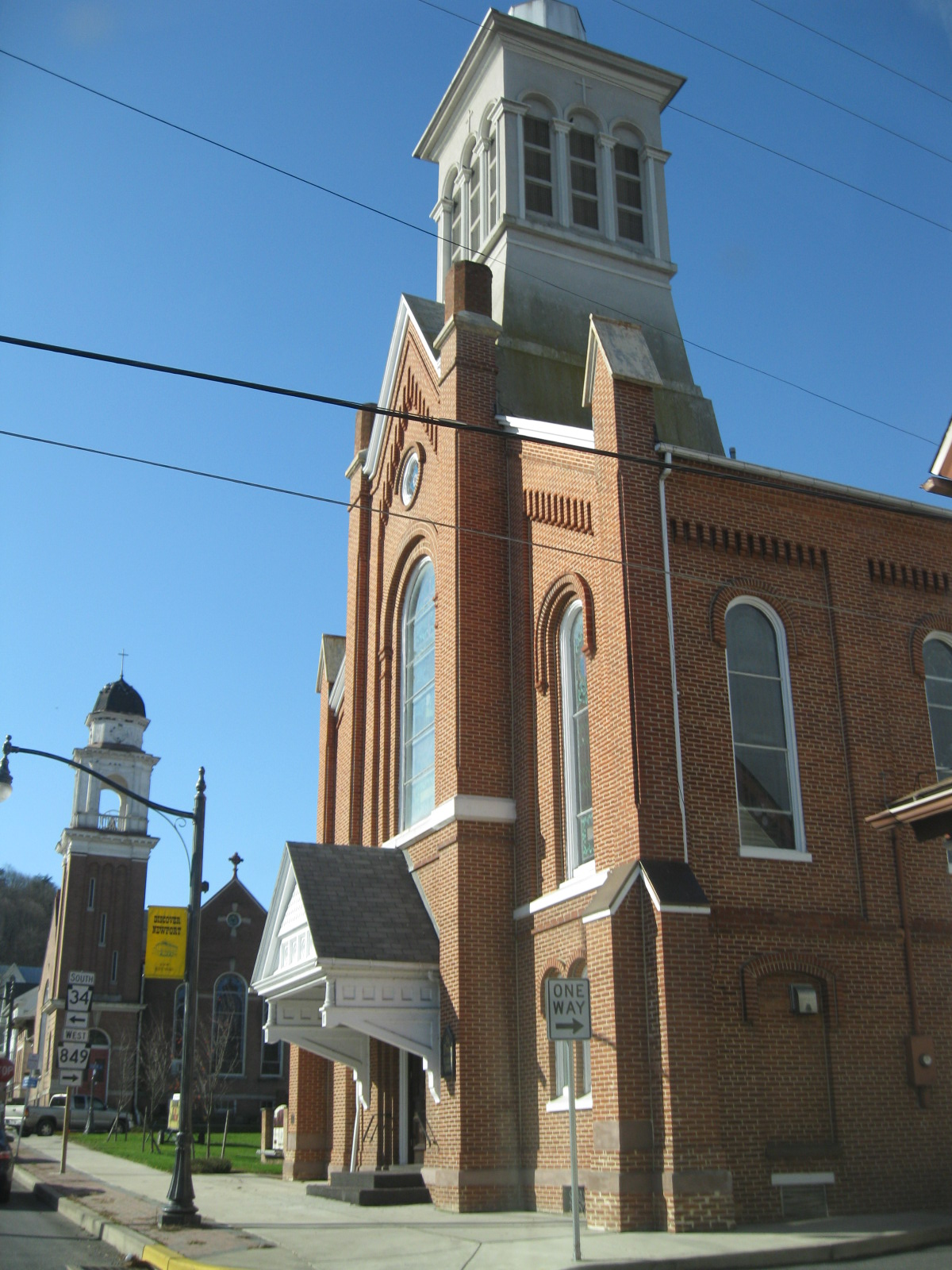 Newport, Pennsylvania